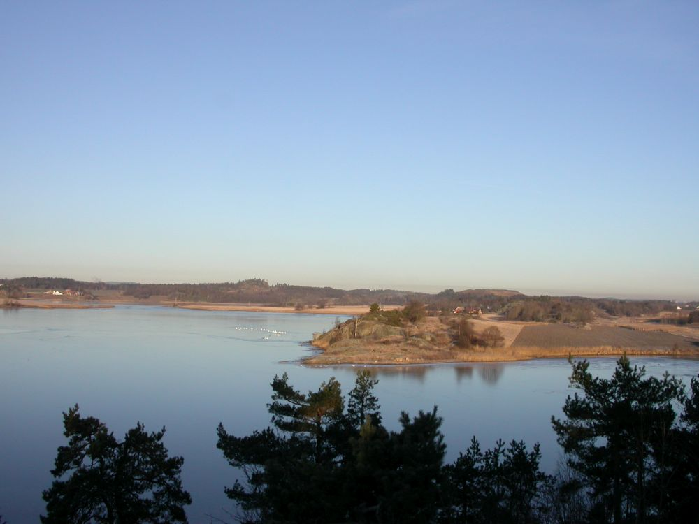 Indre Viksfjord.